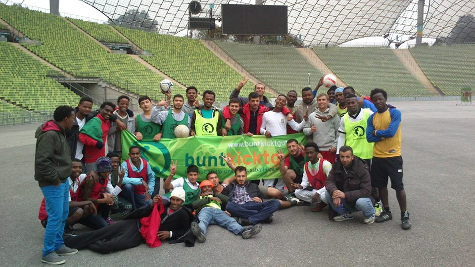 Bis zu 30 Trainingseinheiten bietet buntkicktgut für geflüchtete Menschen allein in München an. Hier bei einer Unterkunft im Olympiastadion München.